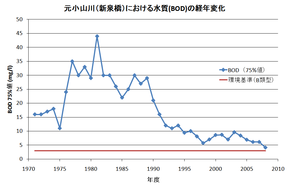 「県道本庄妻沼線交差点」（元小山川の水質基準点）におけるBODの経年変化をグラフ化したものである。(1971-2008)